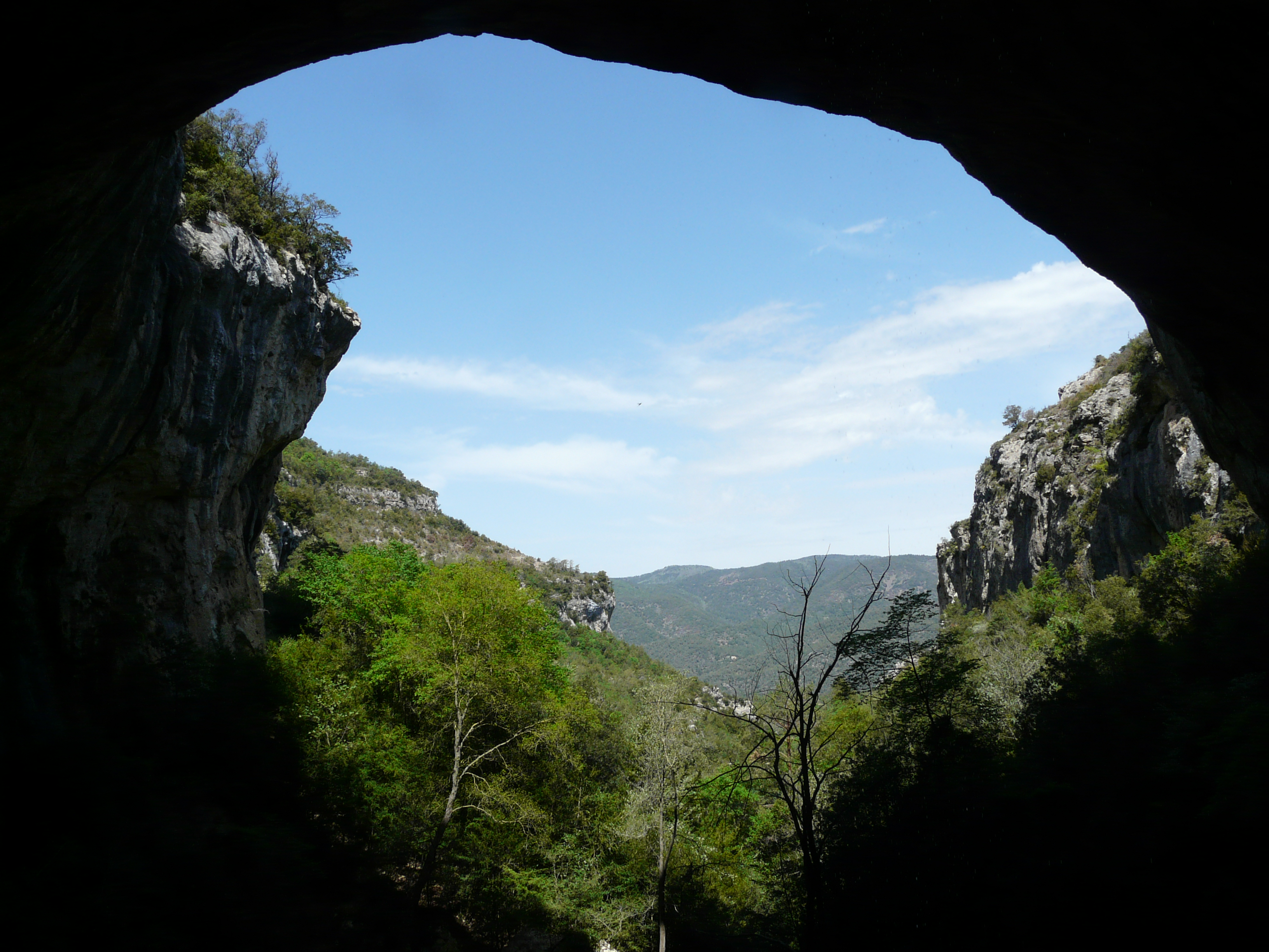 Muntanyes de Prades (Baix Camp, Conca de Barberà, Alt Camp, Priorat, Garrigues) (Montblanc, Vimbodí, Mont-ral i altres). This is a a photo of a natural area in Catalonia, Spain, with id: ES510143 Object location41° 18′ 36″ N, 1° 01′ 48″ E